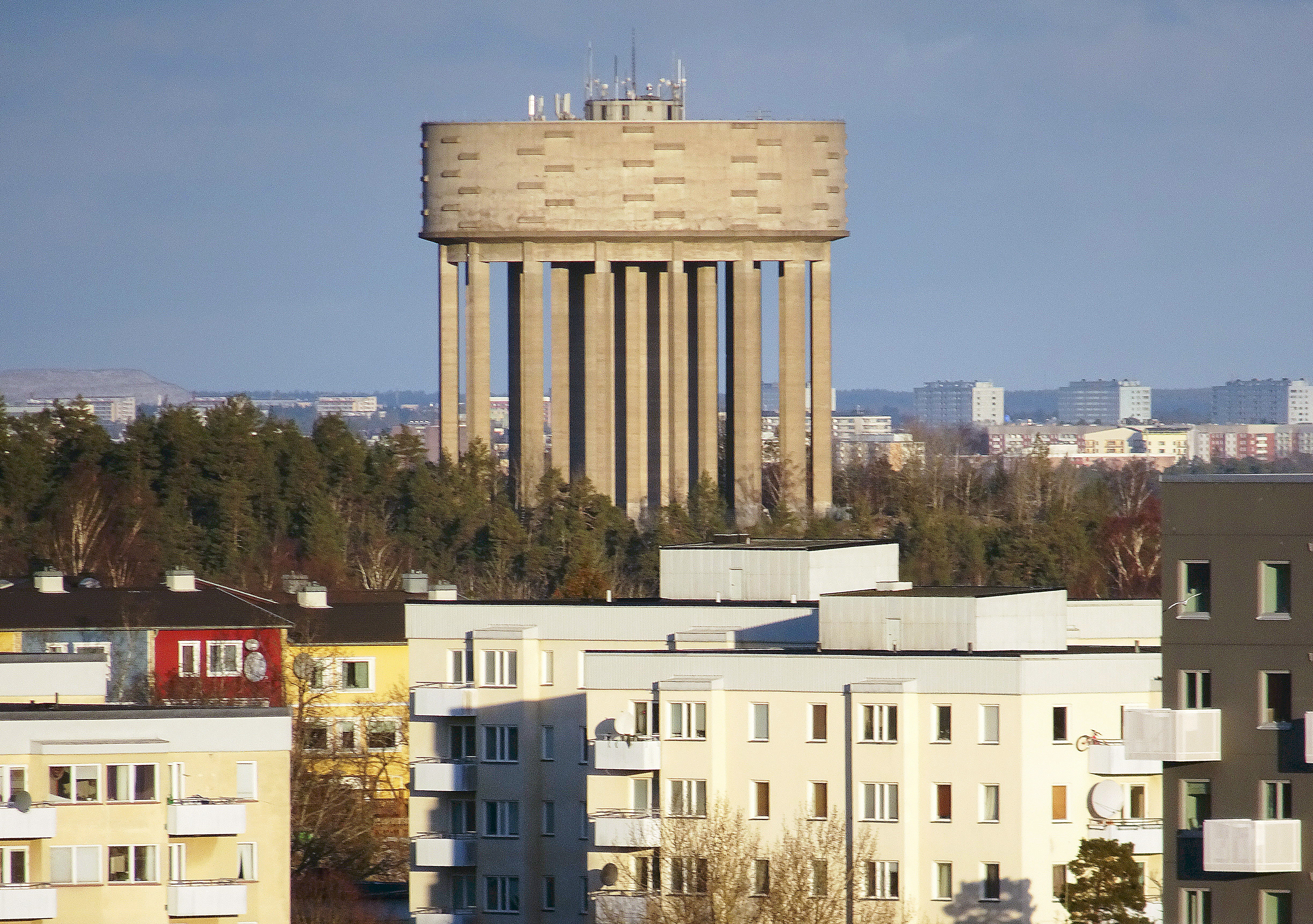 Vårbergstoppen utsikt över Sätra vattentorn